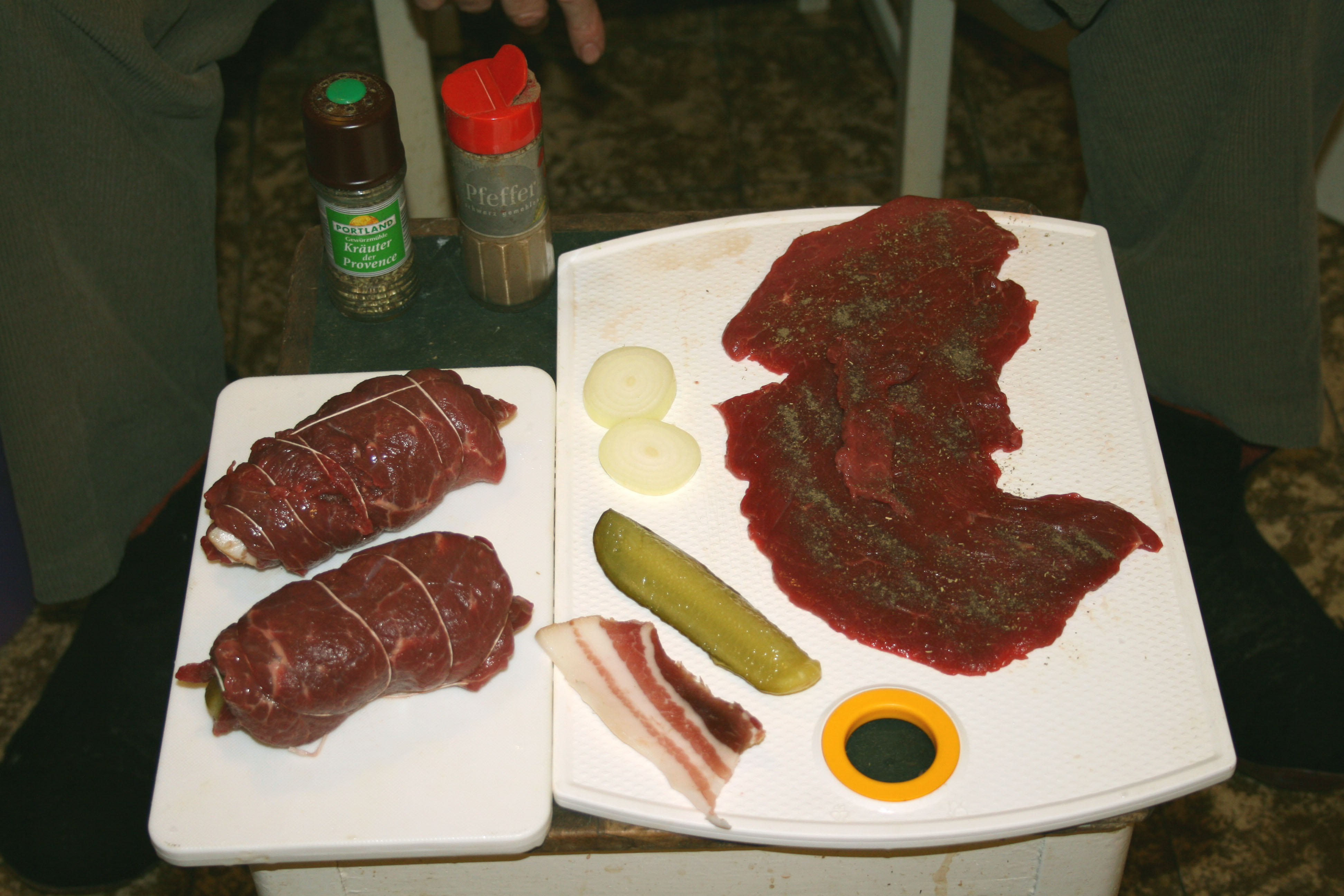 Rinderroulade zutaten